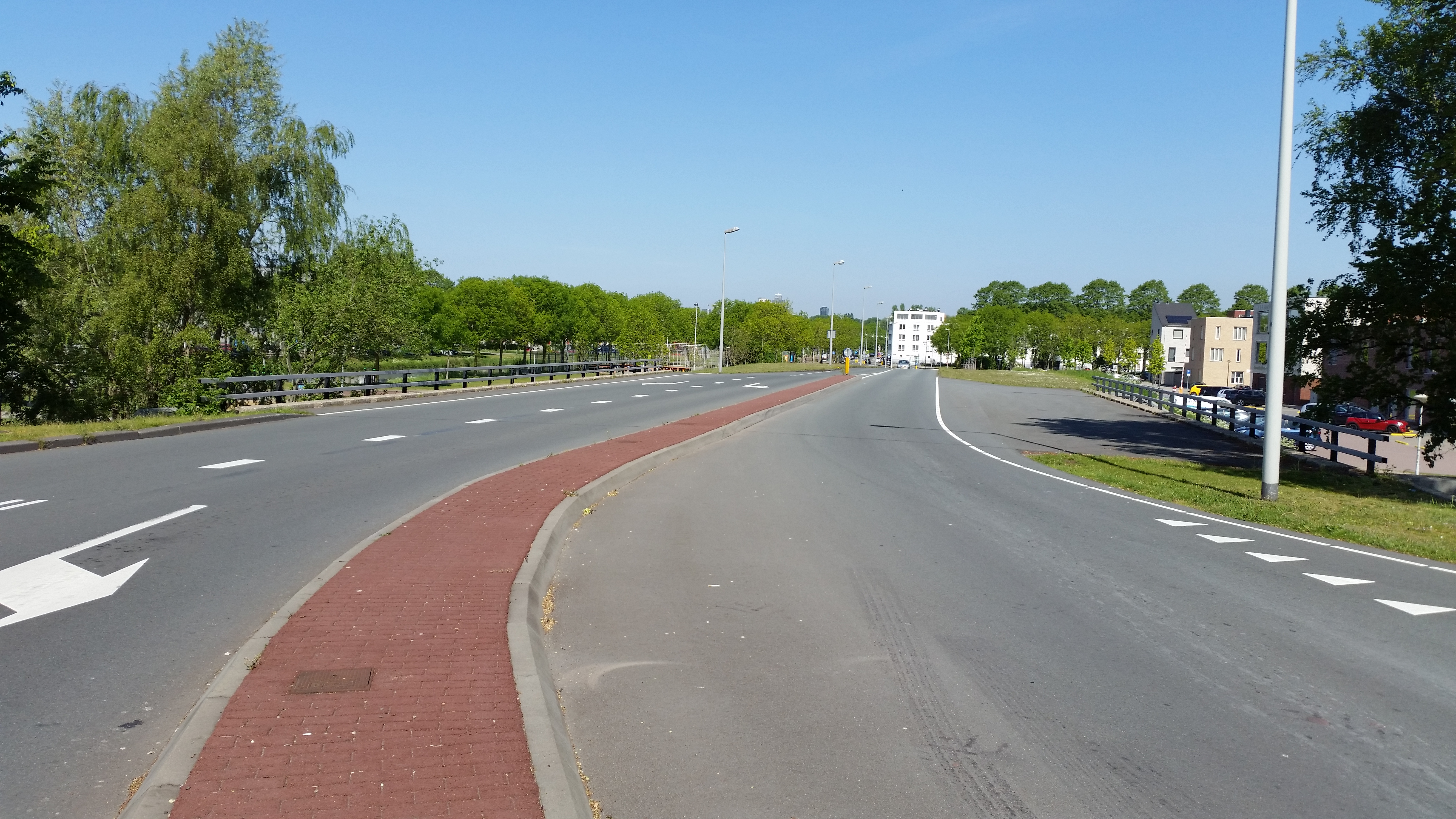 Impressie van de Drostenburgbrug, brug 1246 gelegen in de Dolingadreef, Amsterdam-Zuidoost